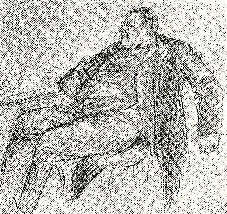 Henning Berger, svenska författare; karikatyr av "O.A.".